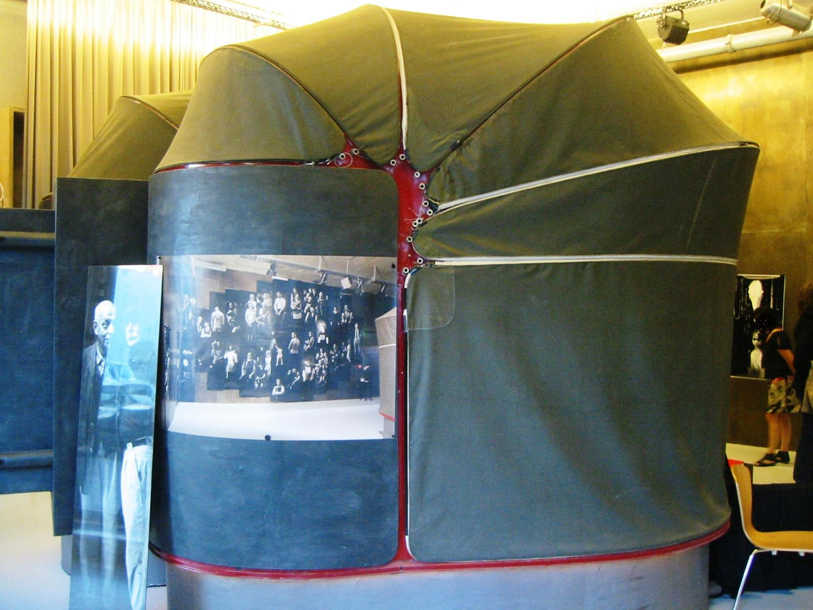 Größte begehbare Großformatkamera "Imago 1:1" im Kunstraum "Imago 1:1" in Berlin-Kreuzberg